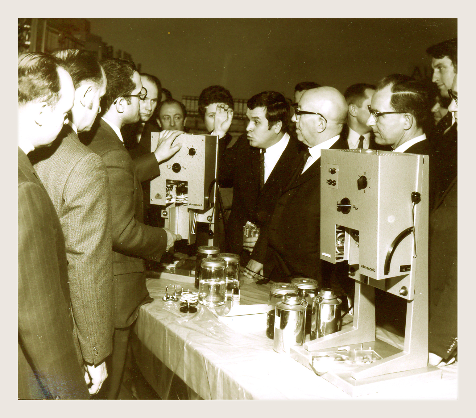 Um die 1960 - Flume Erfahrungsaustausch